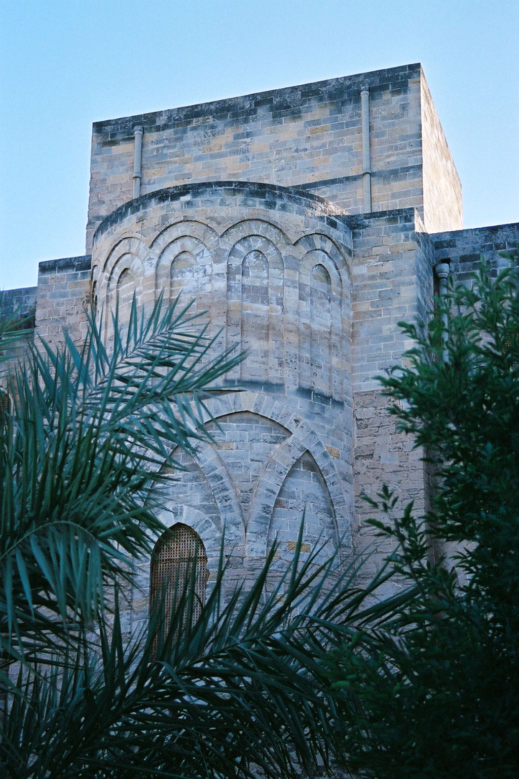 La Magione, Palermo (Chiesa della SS Trinità) Rear view, apse